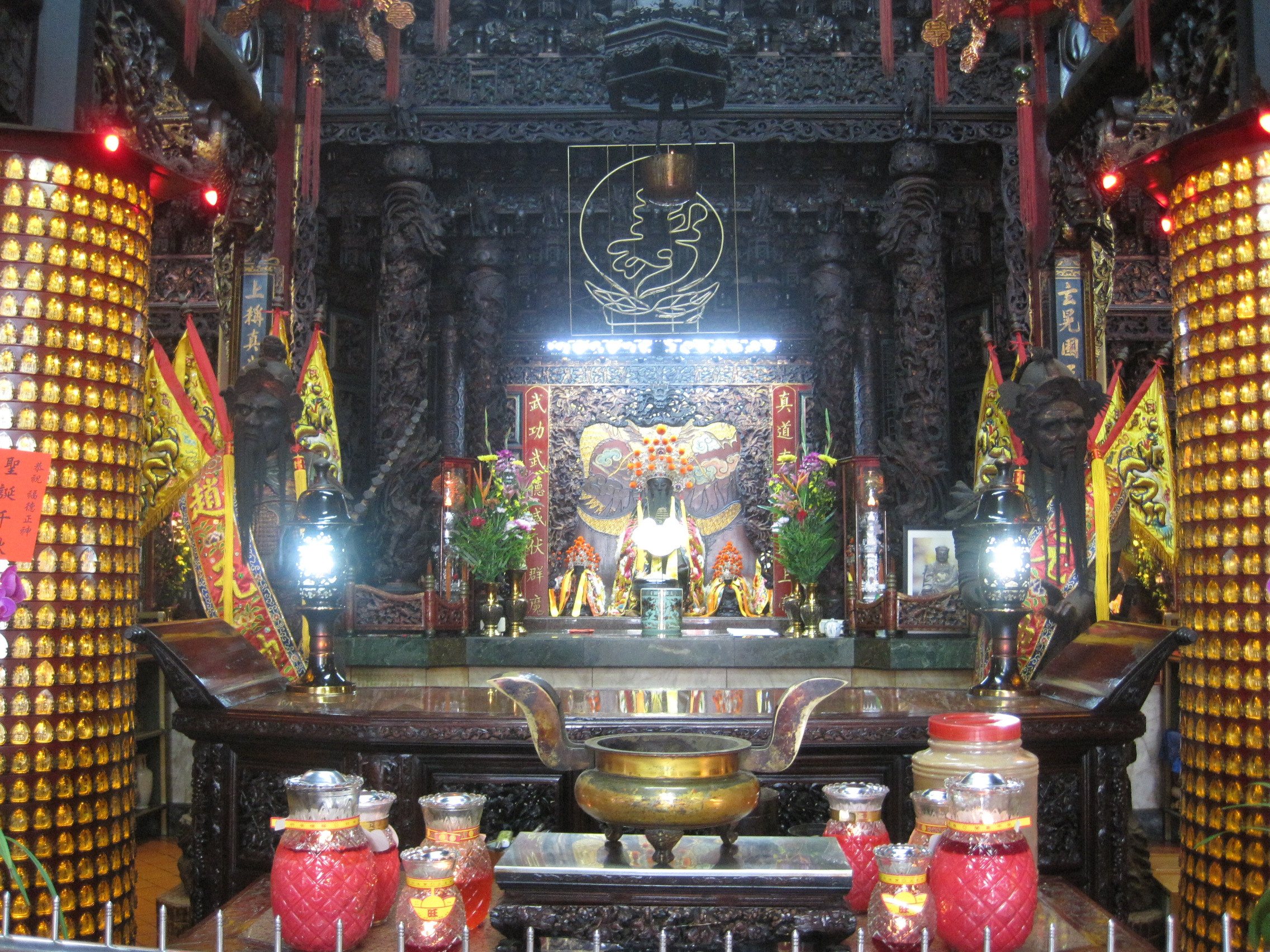 中文（台灣）: 新營真武殿正殿